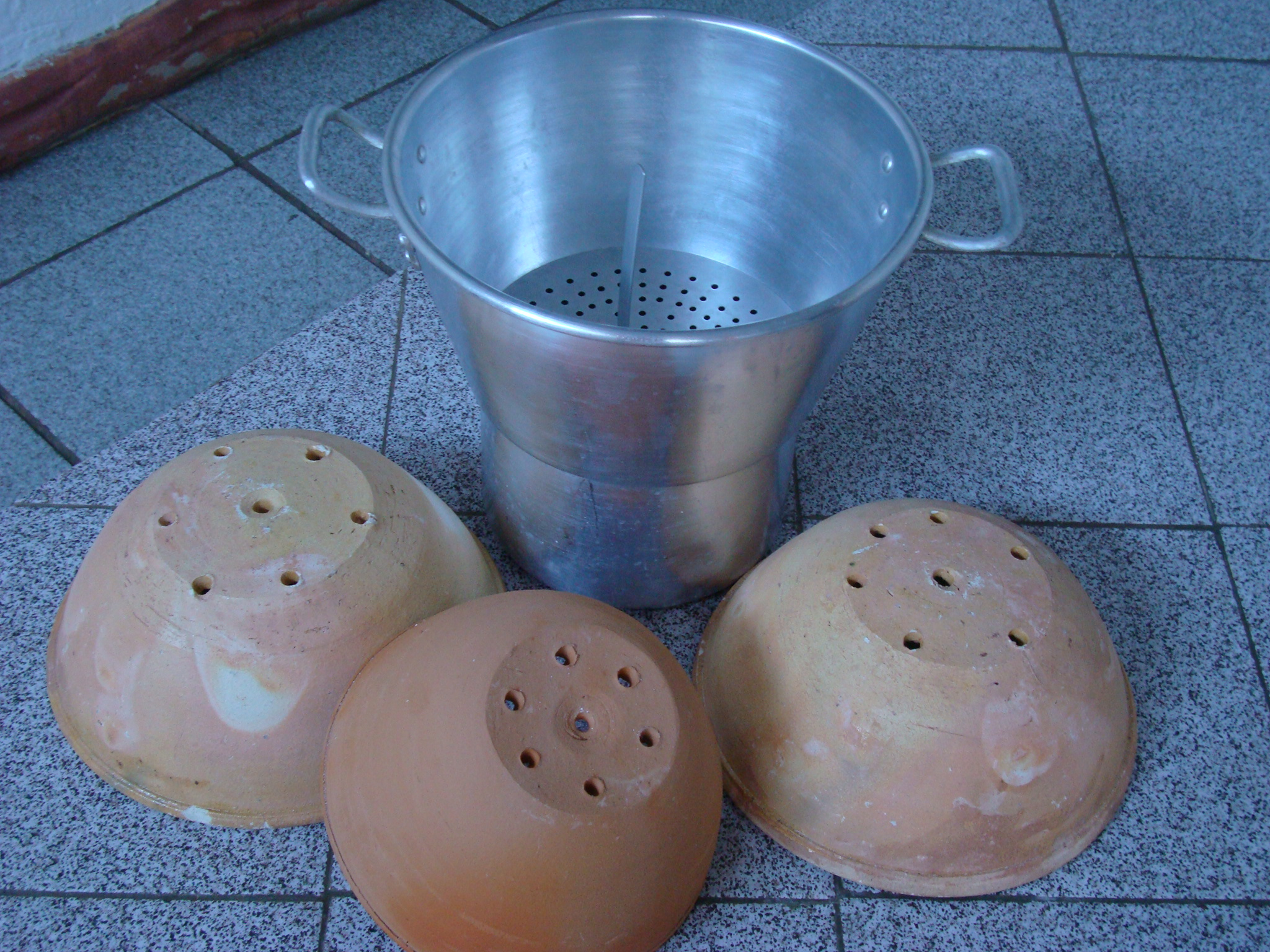 Cuscuzeiro de alumínio e Barro, utensílio para fazer Cuscuz.